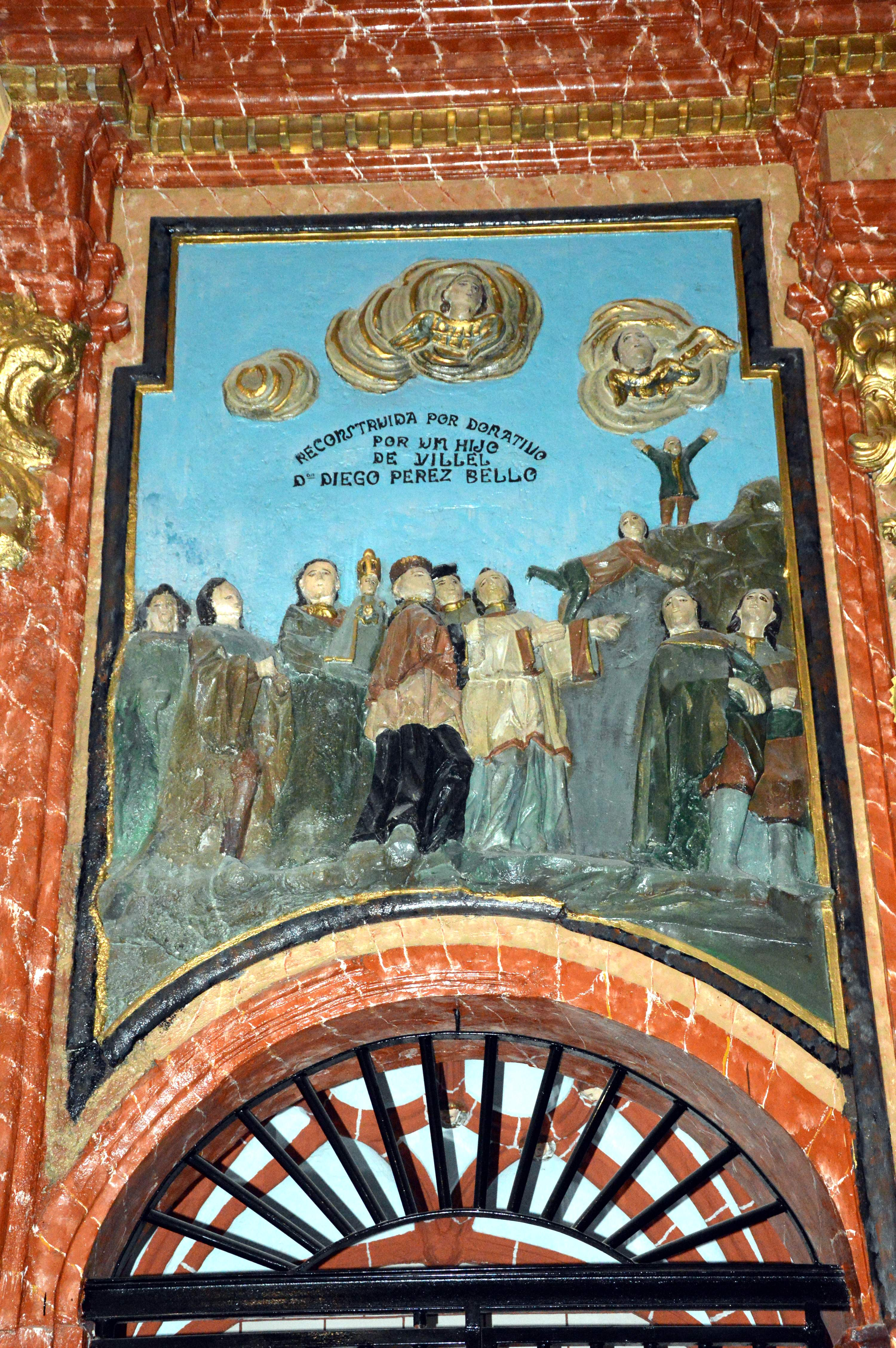 Santuario de la Fuensanta en Villel (Teruel), con detalle del frontal del presbiterio, lado del evangelio (2019).